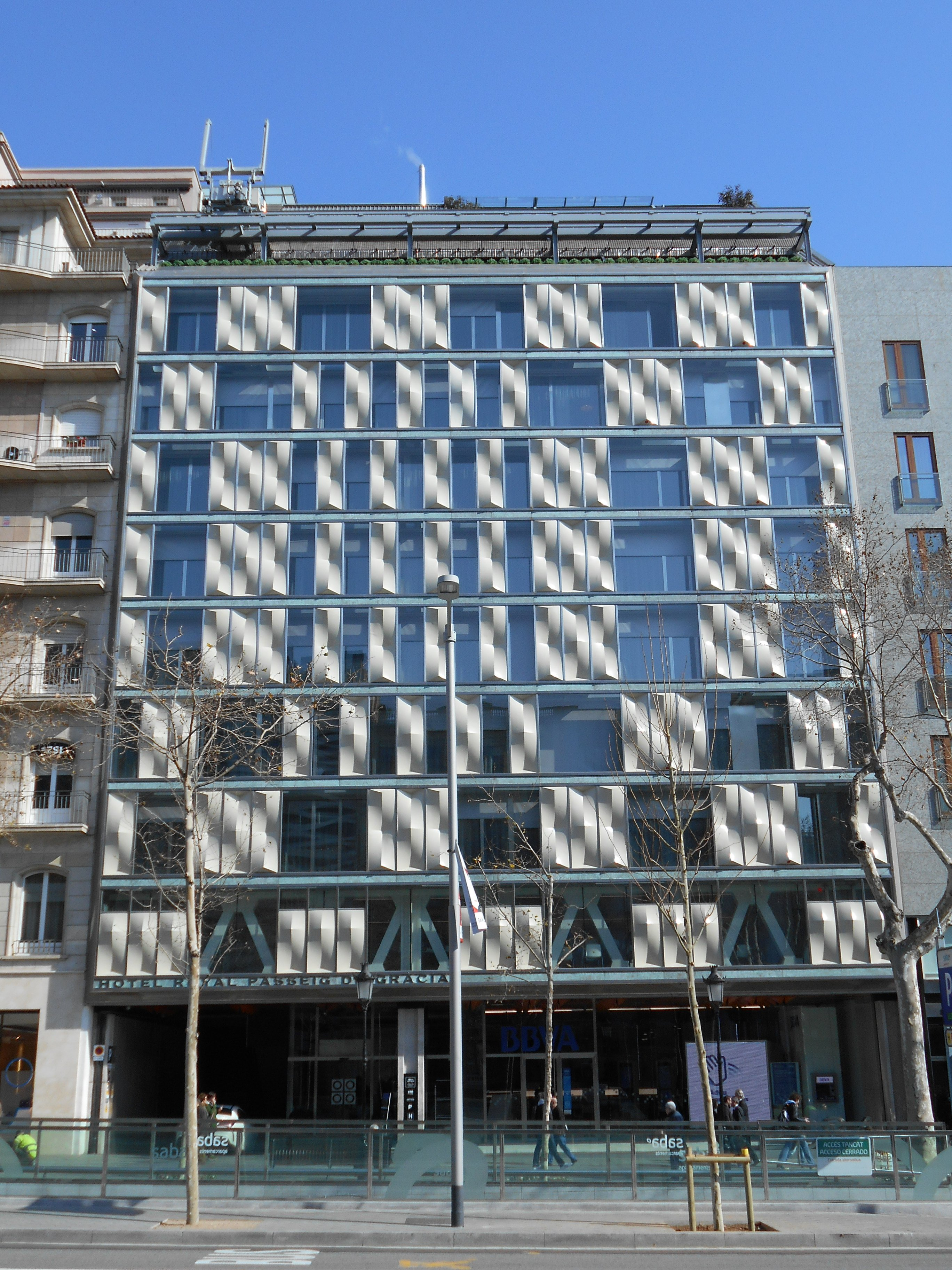 Edificio de la Banca Catalana (1965- 1968), de Enric Tous y Josep Maria Fargas.